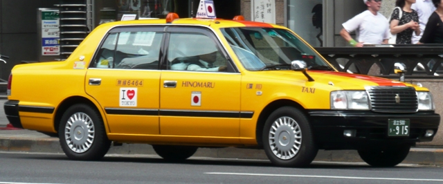 Hinomaru taxi.